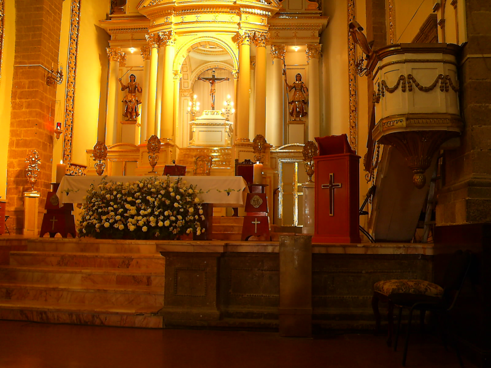 Interior de la Iglesia de San Cristóbal Ecatepec